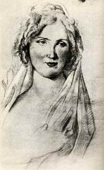 Angela Pietragrua (1777-?), amante di Stendhal. Incisione